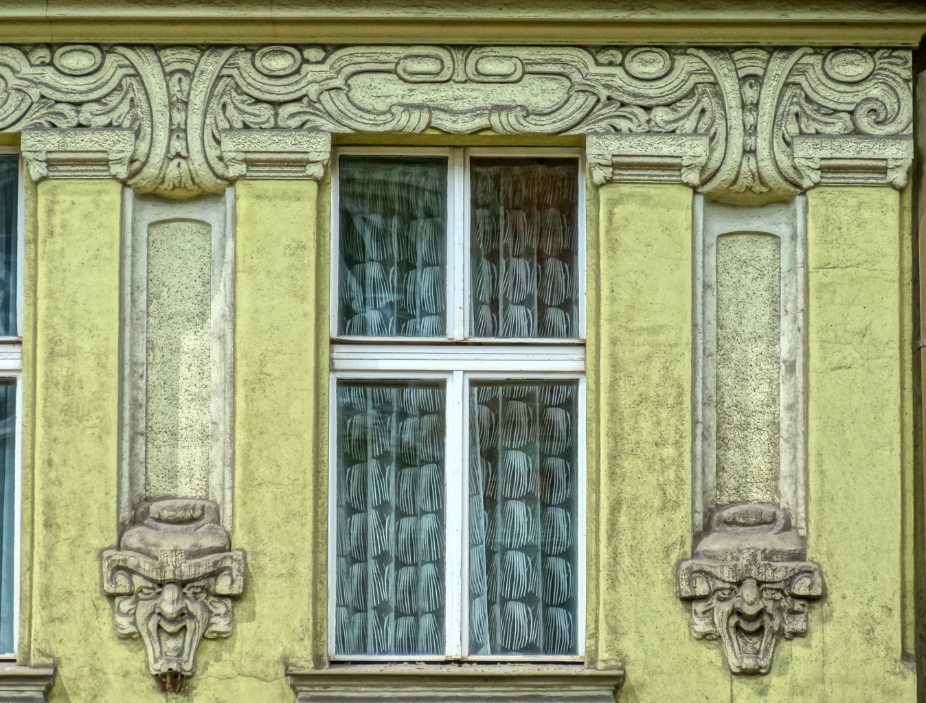 Kamienica przy ul. Gdańskiej 71 w Bydgoszczy (1906-1908)